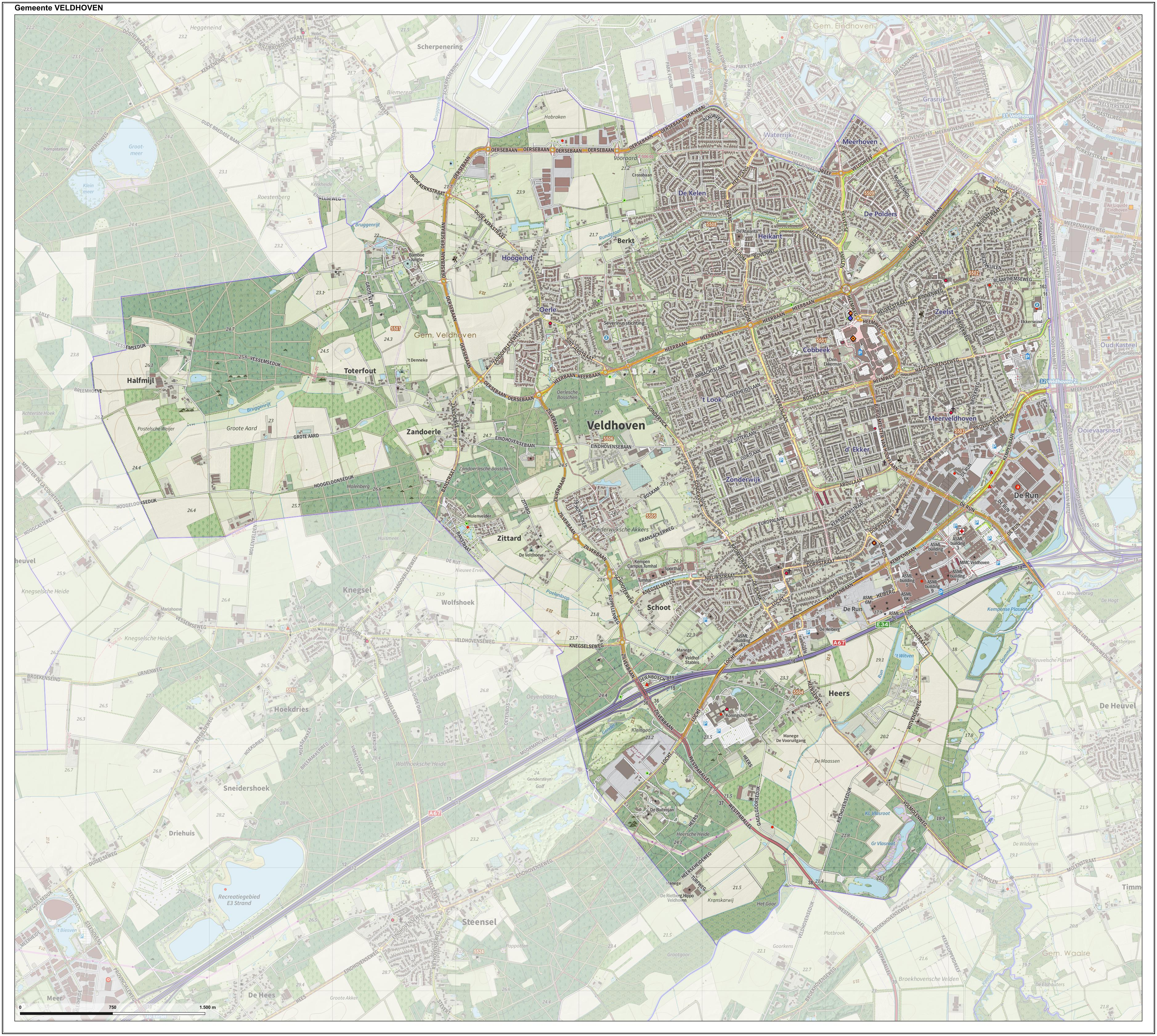 Topografische gemeentekaart. Resolutie: 400 pixels/km. Kaartbeeld samengesteld uit de open geodata van de Top10NL en Top25namen, Creative Commons BY licentie. Gebouwvlakken uit open geodata BAG extract. Wegen uit de OpenStreetMap, OpenStreetMap community. Schaduwreliëf uit de Actuele Hoogtekaart AHN2. Samenstelling en kleurenschema: Jan-Willem van Aalst, met QGIS2. Zie ook de Legenda.